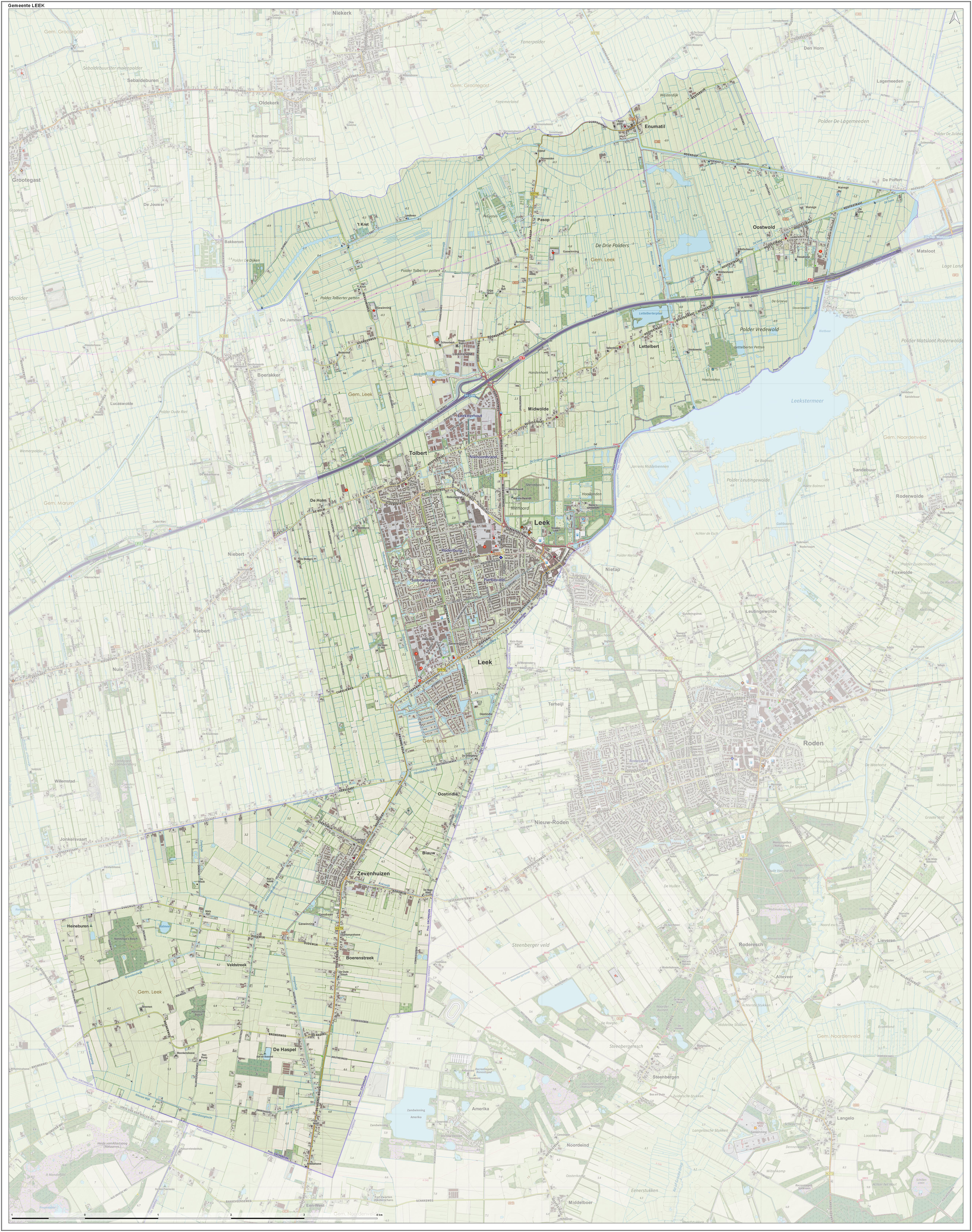 Topografische gemeentekaart. Resolutie: 400 pixels/km. Kaartbeeld samengesteld uit de open geodata van de Top10NL en Top25namen (Kadaster), Creative Commons-BY licentie. Gebouwvlakken uit open geodata BAG extract. Wegen uit de OpenStreetMap, OpenStreetMap community. Reliëfschaduw uit de Actuele Hoogtekaart AHN2. Samenstelling en kleurenschema: Jan-Willem van Aalst, met QGIS. Zie ook de Legenda.